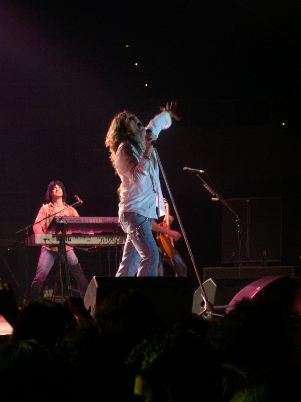 David Coverdale